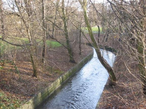 Bäke, Fließ im Bäkepark in Berlin-Steglitz